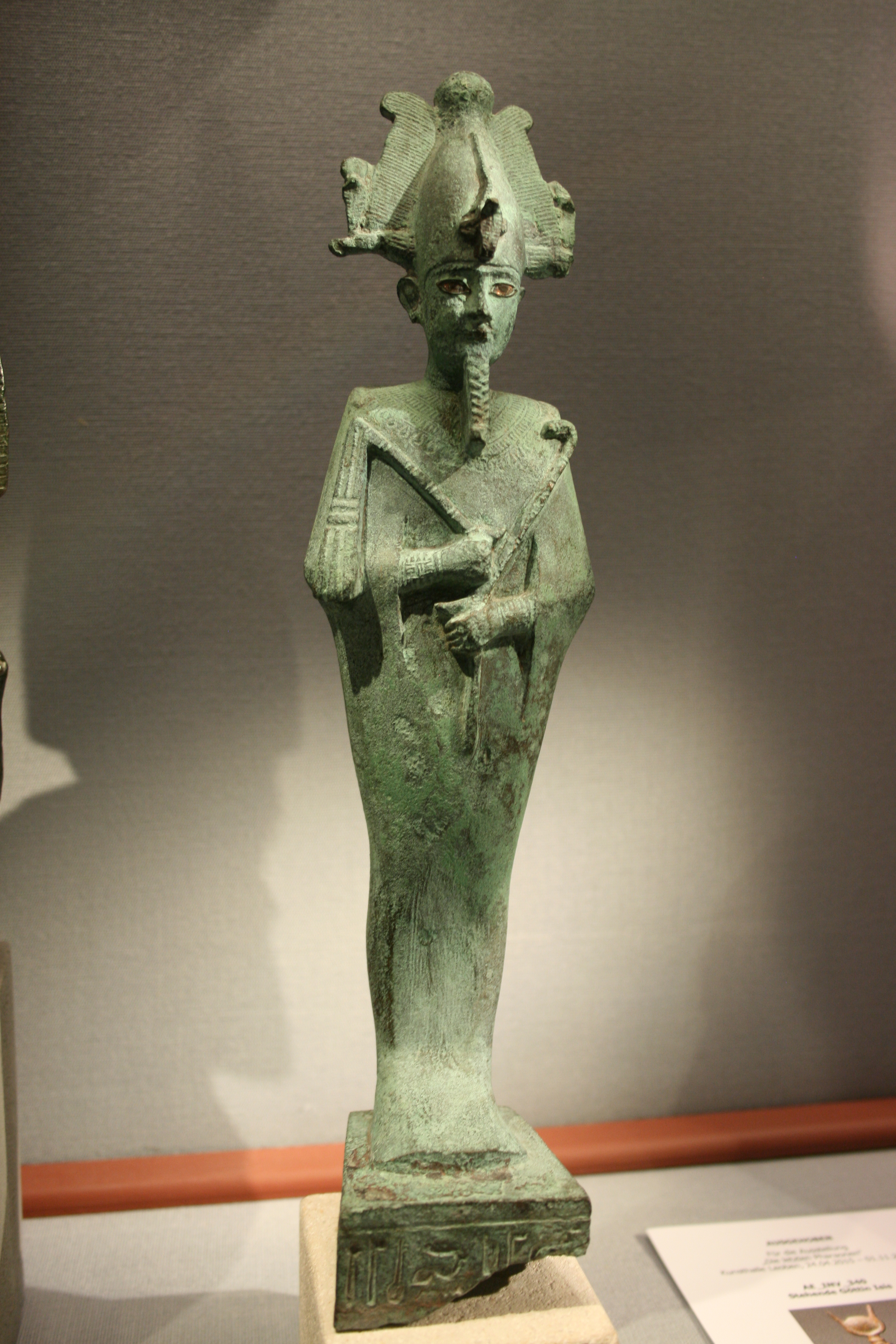 Osiris mit Atef-Krone aus Bronze